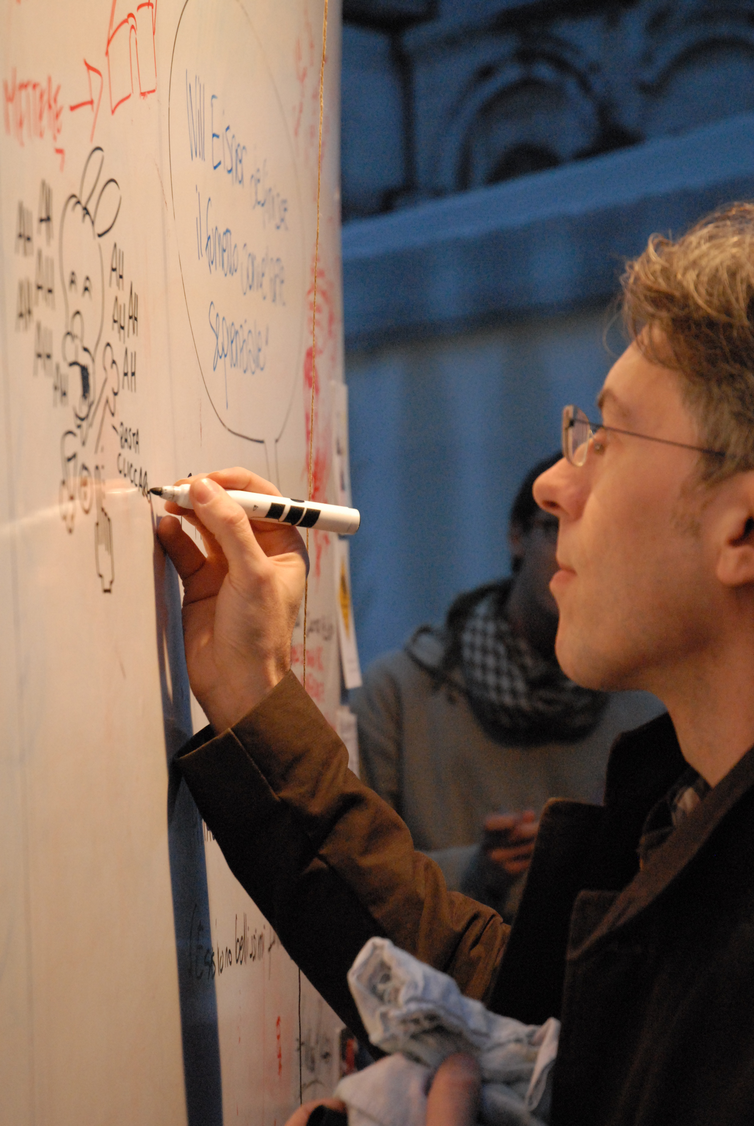 Leo Ortolani disegna sul Wikiwall di Wikimedia Italia Photo taken during Lucca Comics&Games 2010